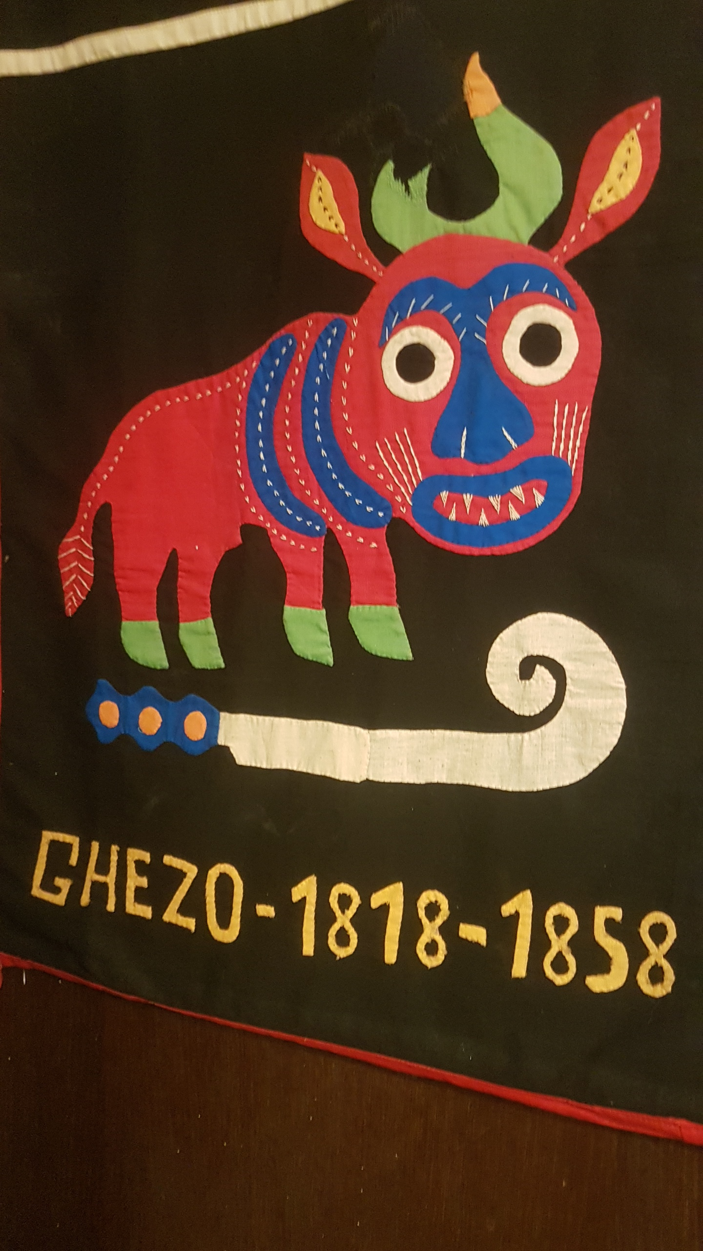 Српски (ћирилица): Дахомејска тканина - Владар Ghezo (1818-1858)